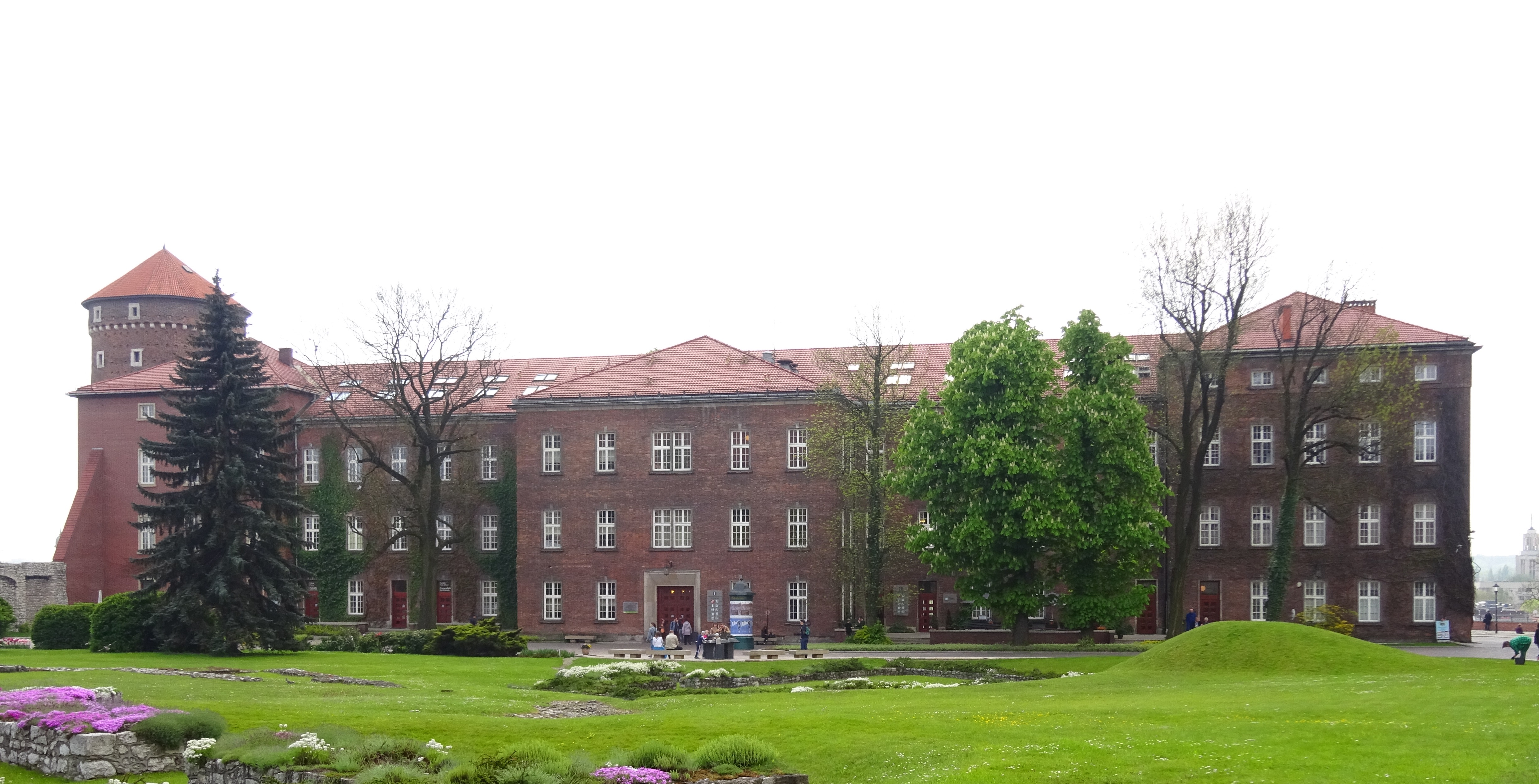 Budynek Austriackiego Szpitala na Wawelu. Widok od strony wschodniej (dziedzińca zewnętrznego). Kraków, 2016.